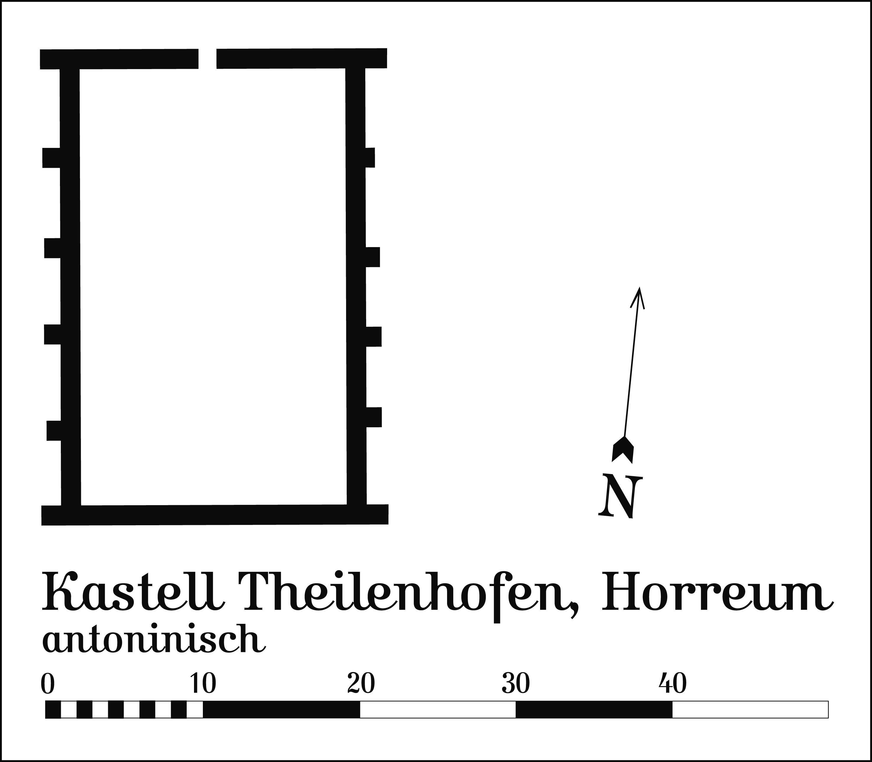 Kastell Theilenhofen, Bayern, Horreum (Getreidespeicher)